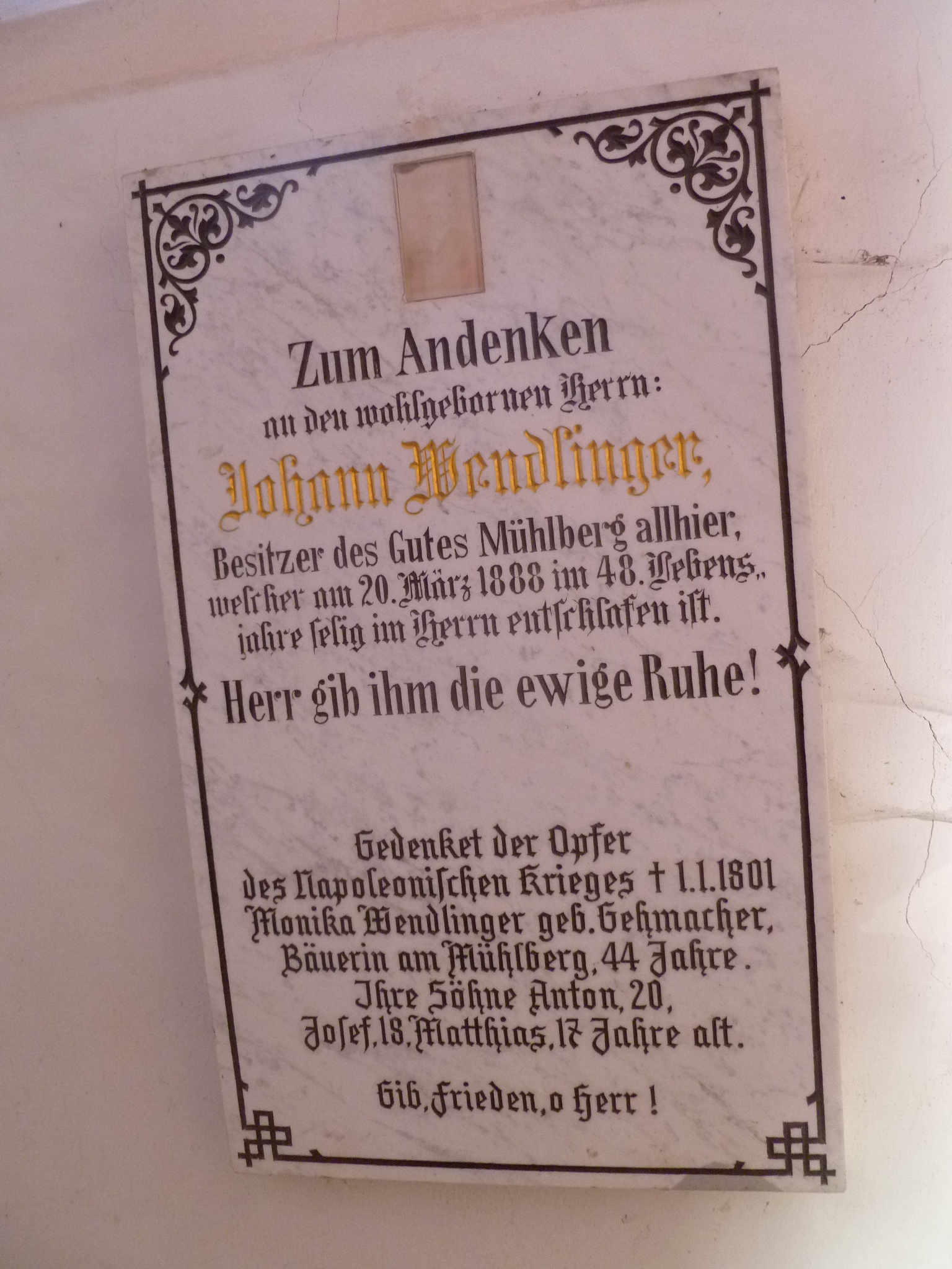 Kath. Filialkirche hl. Leonhard in Mühlberg